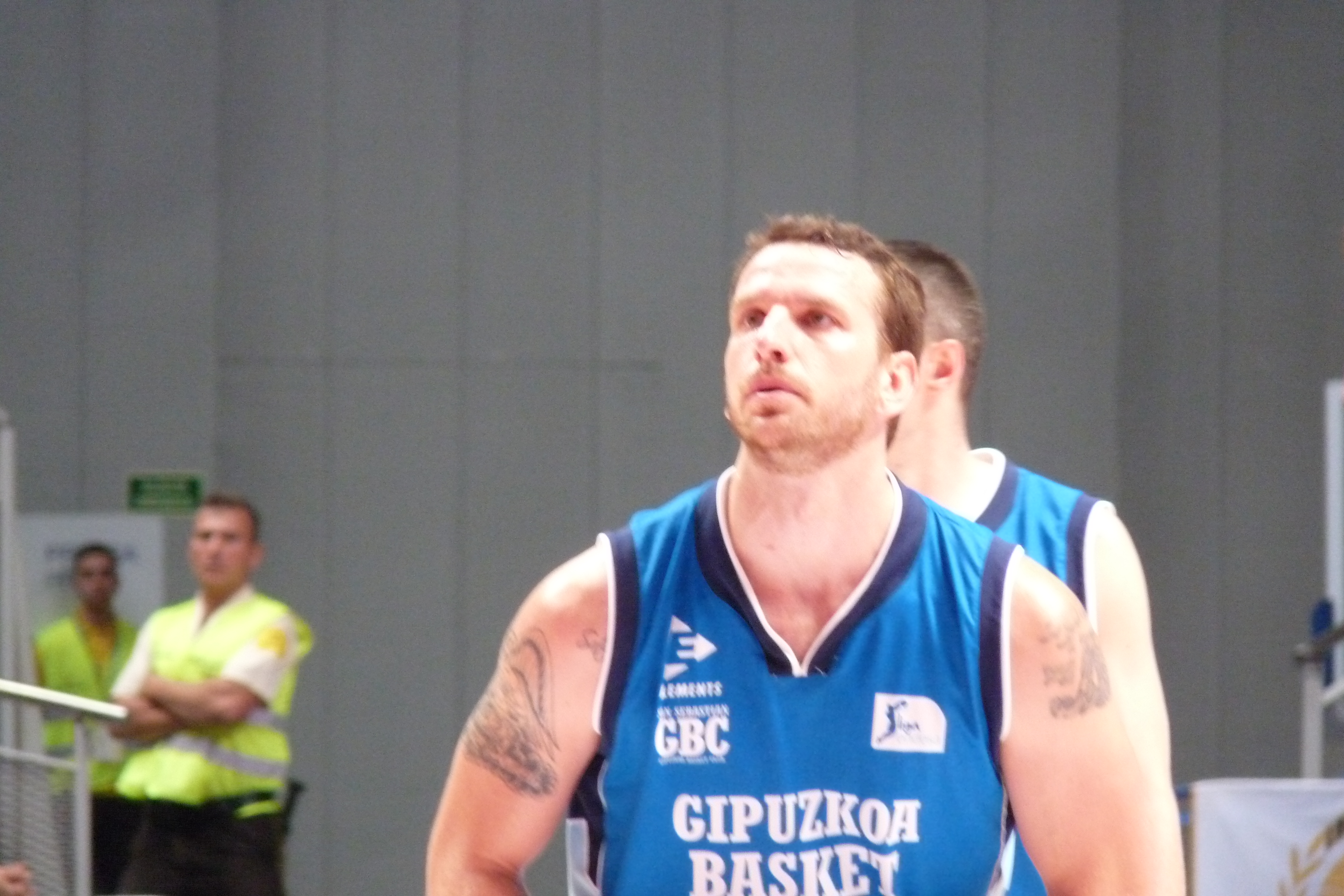 Winchester en partido Real Madrid-San Sebastián, año 2014